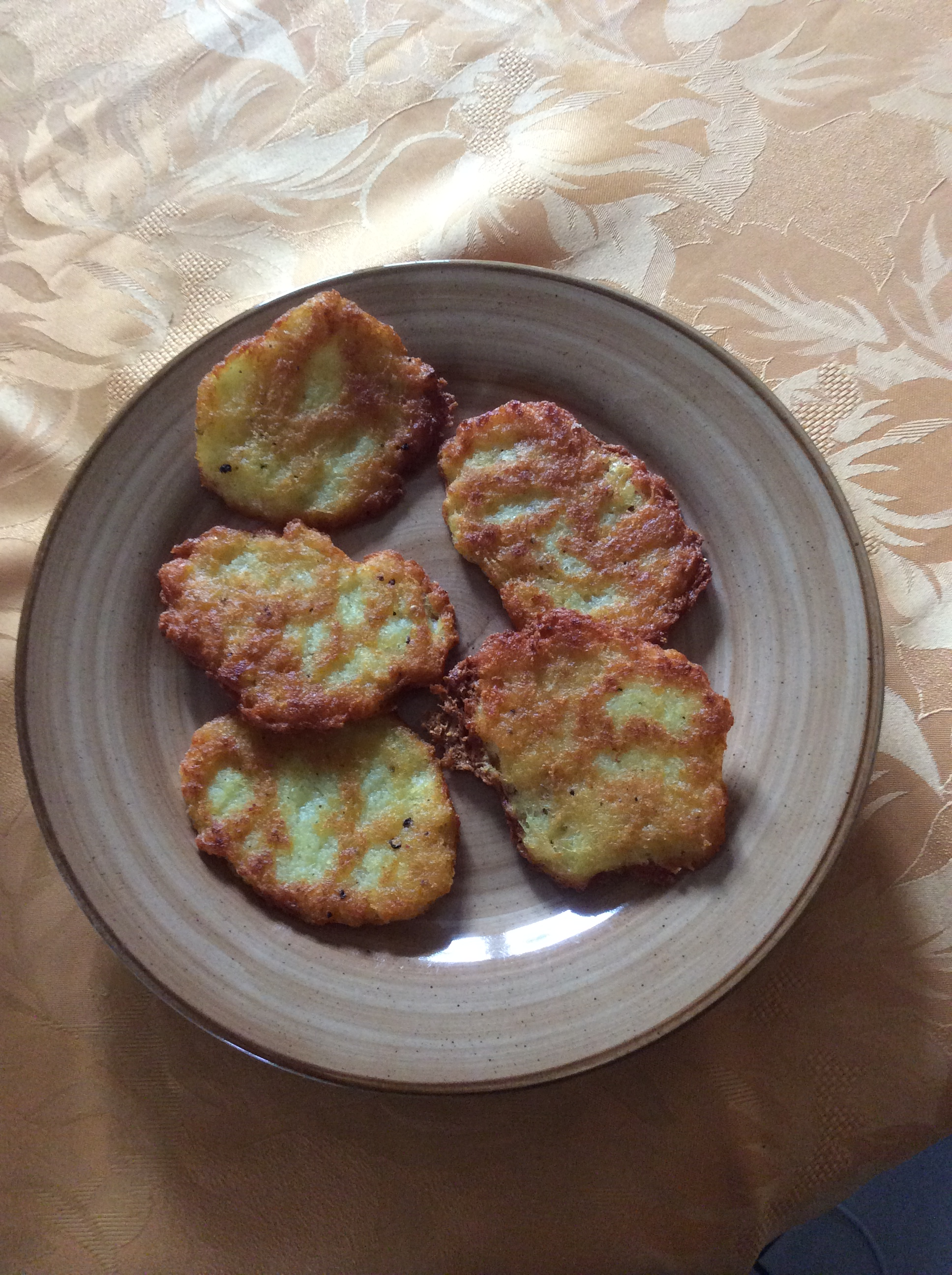 Beignets râpés vo